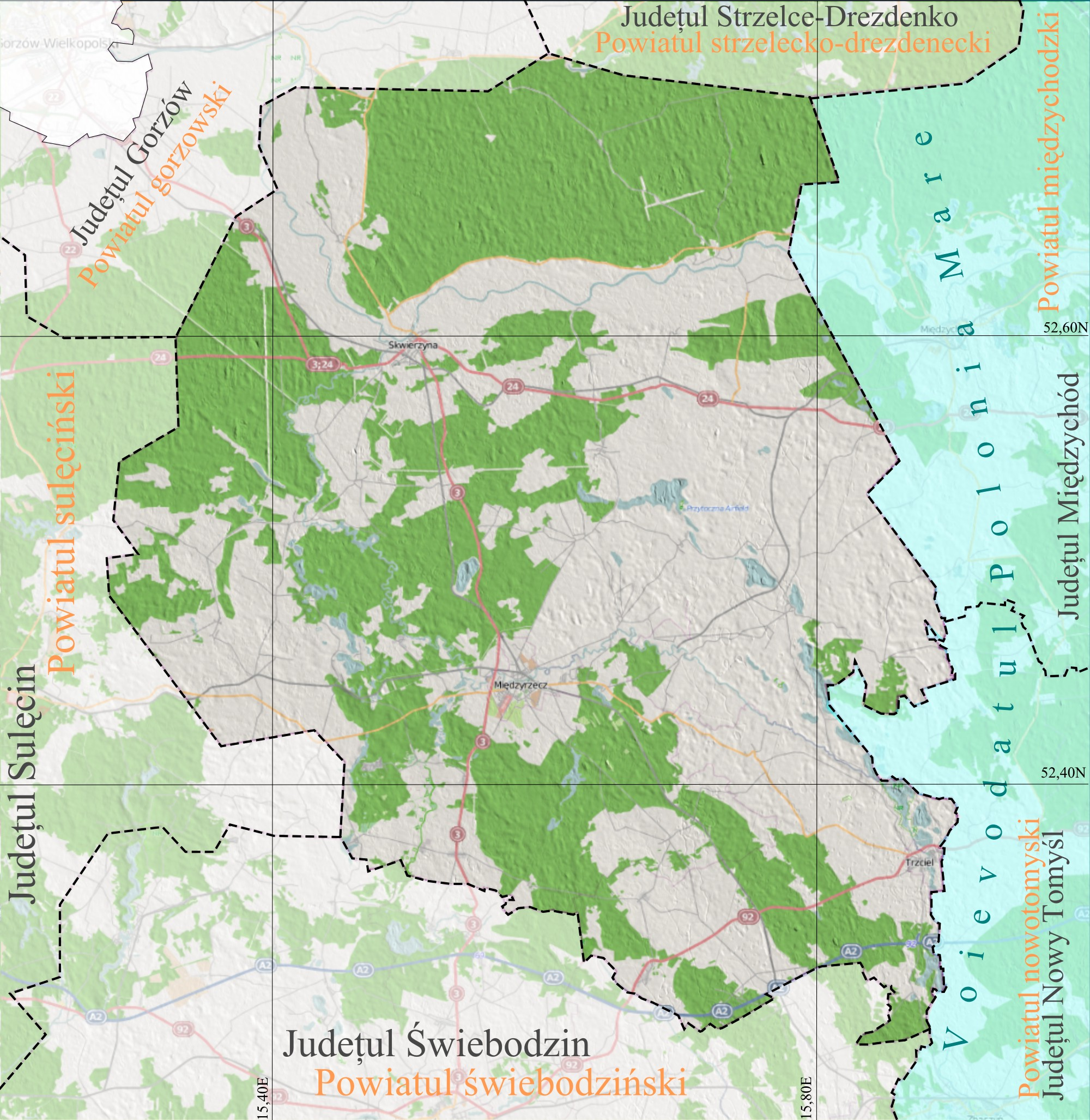 Harta de localizare a Judeţului Międzyrzecz din Voievodatul Poloniei, Lubusz. Coordonate: Top: 52.75 Bottom: 52.25 Left: 15.20 Right: 16.00